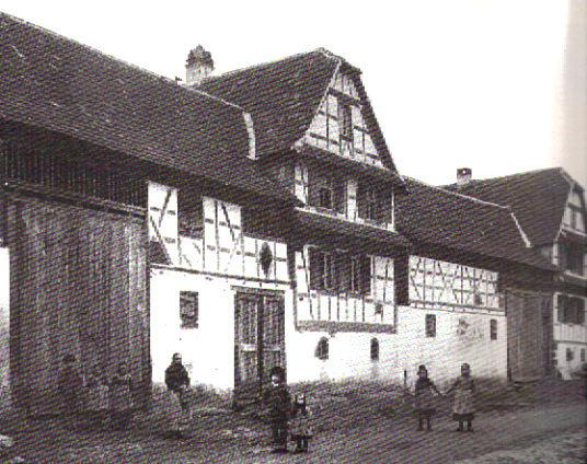 photo ancienne, Duntzenheim, Bas-Rhin, France